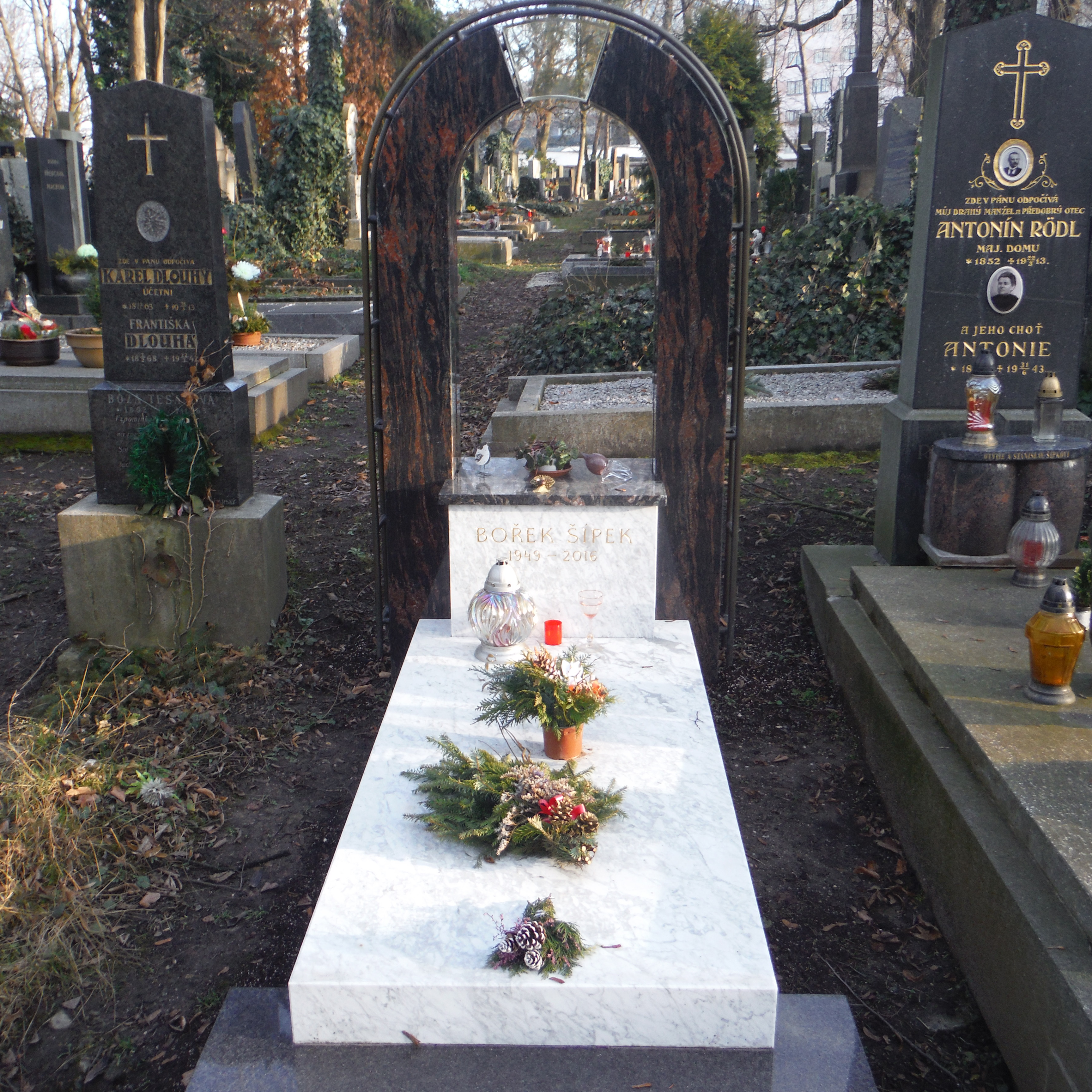 hrob